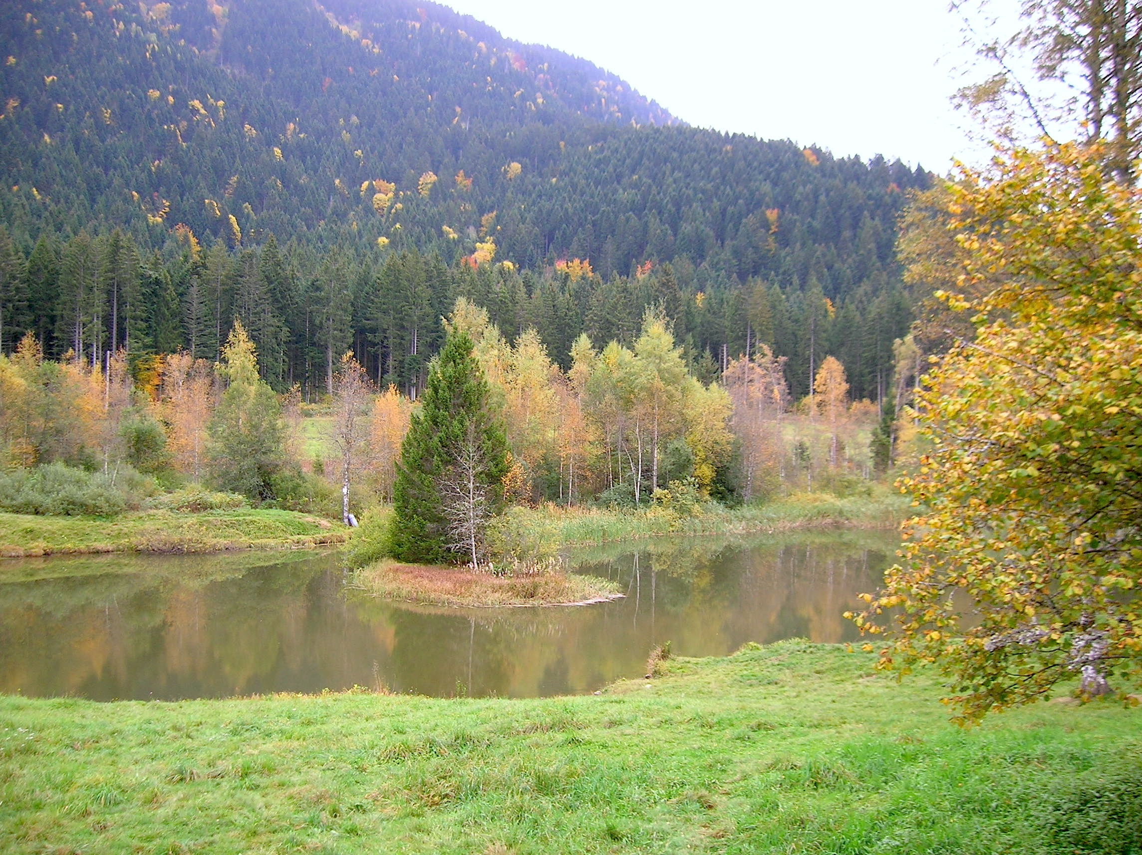 Le marais des Seiglière, Saint-Martin d'Uriage, Isère, France.